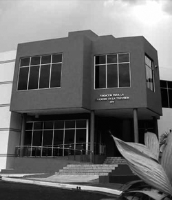 instalacione fetv